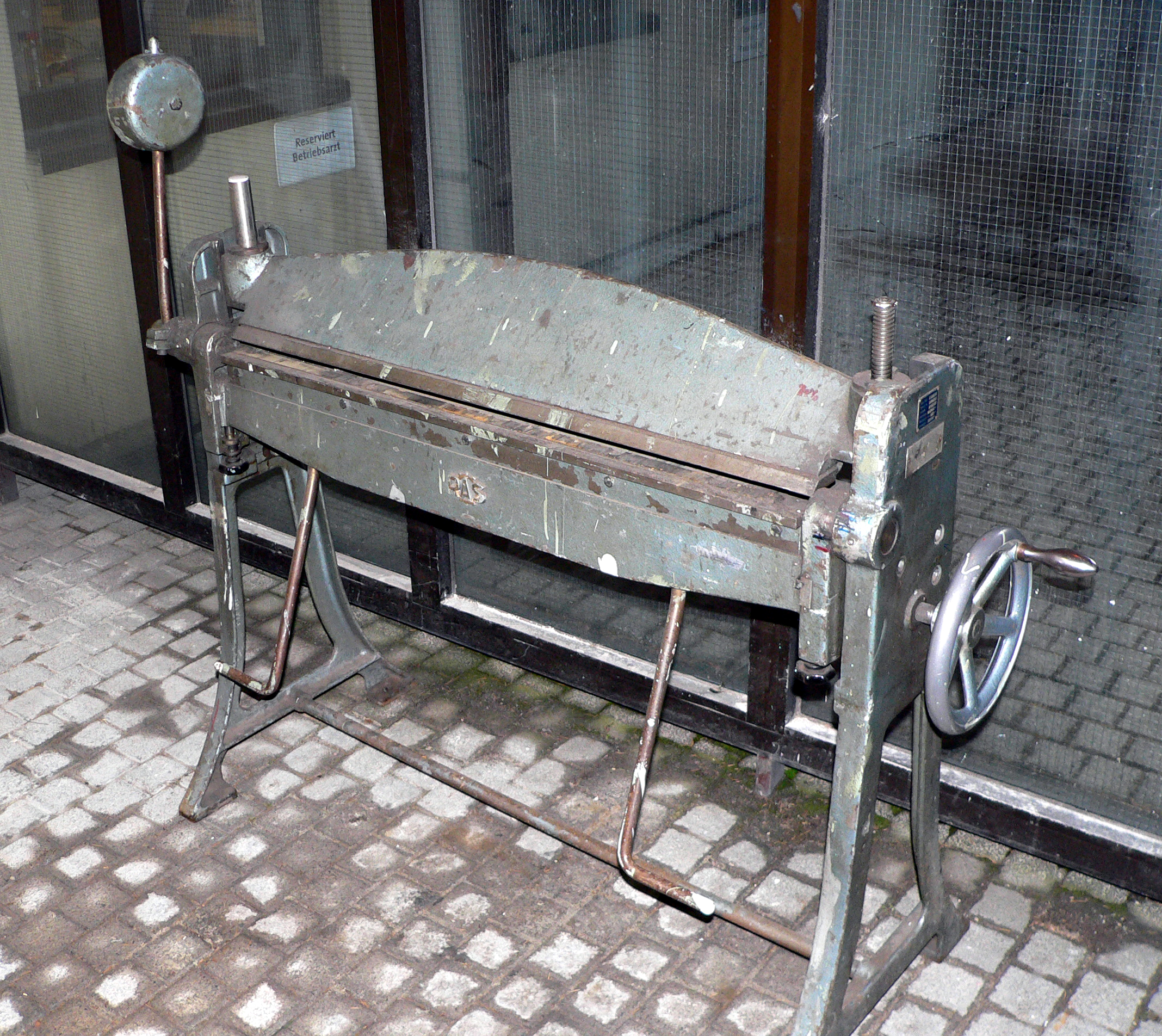 Bildinhalt: Alte und schmutzige Handschwenkbiegemaschine Aufnahmeort: Baden-Baden, Deutschland